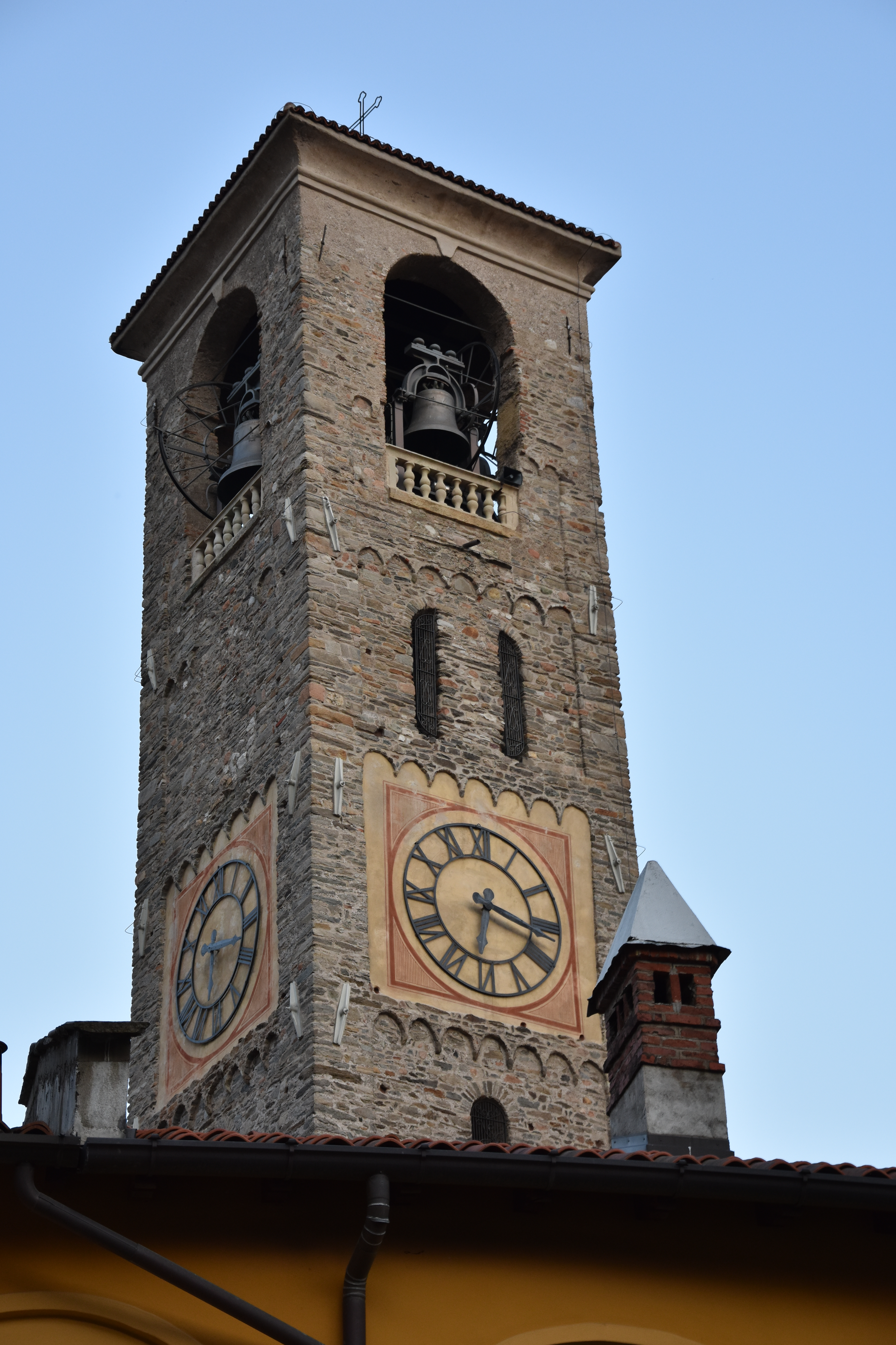 Basilica di San Vittore ad Arcisate.